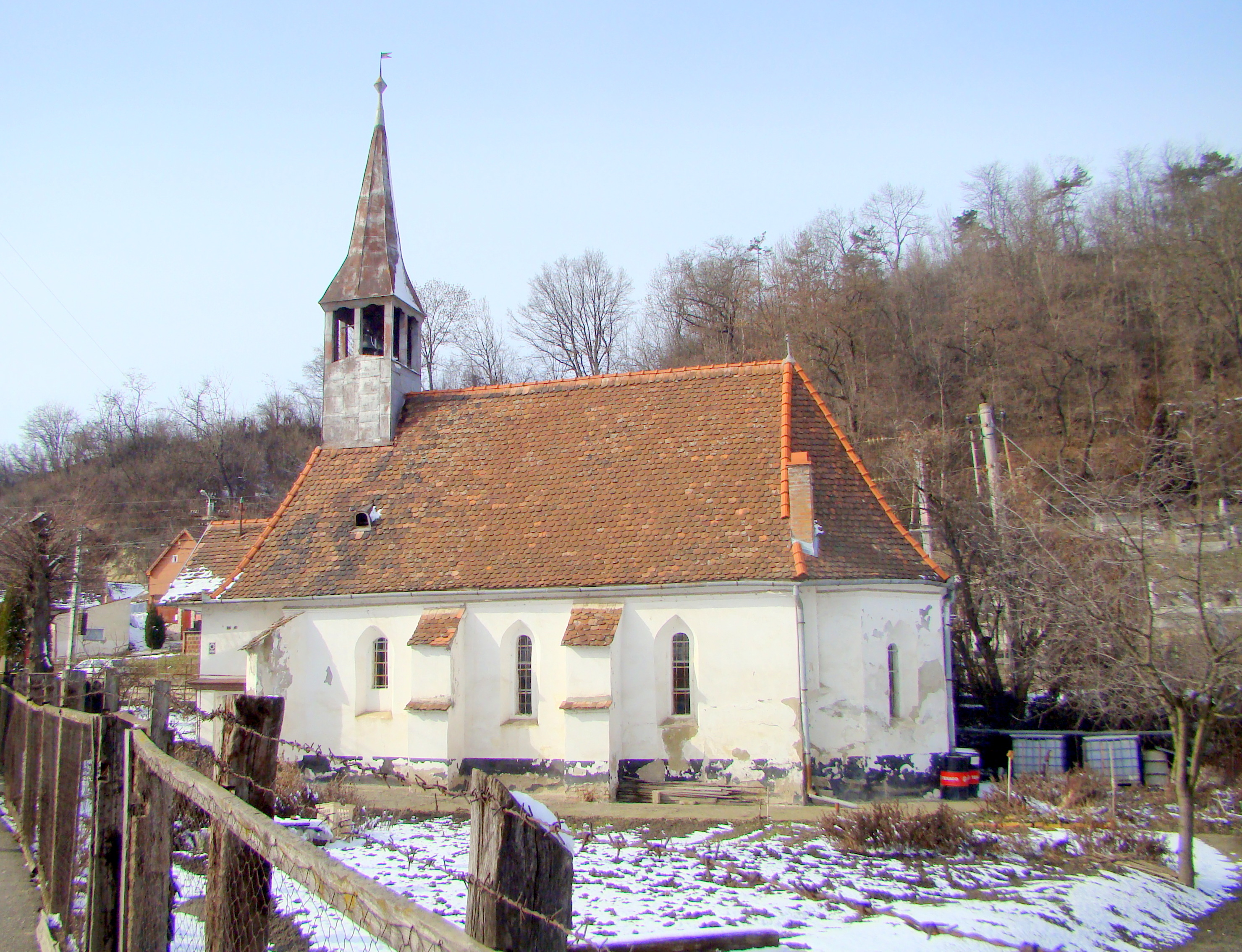 Biserica leproșilor („Siechhof”), municipiul Sighișoara, str. Ștefan cel Mare 34 1647, 1684, 1814, 1854